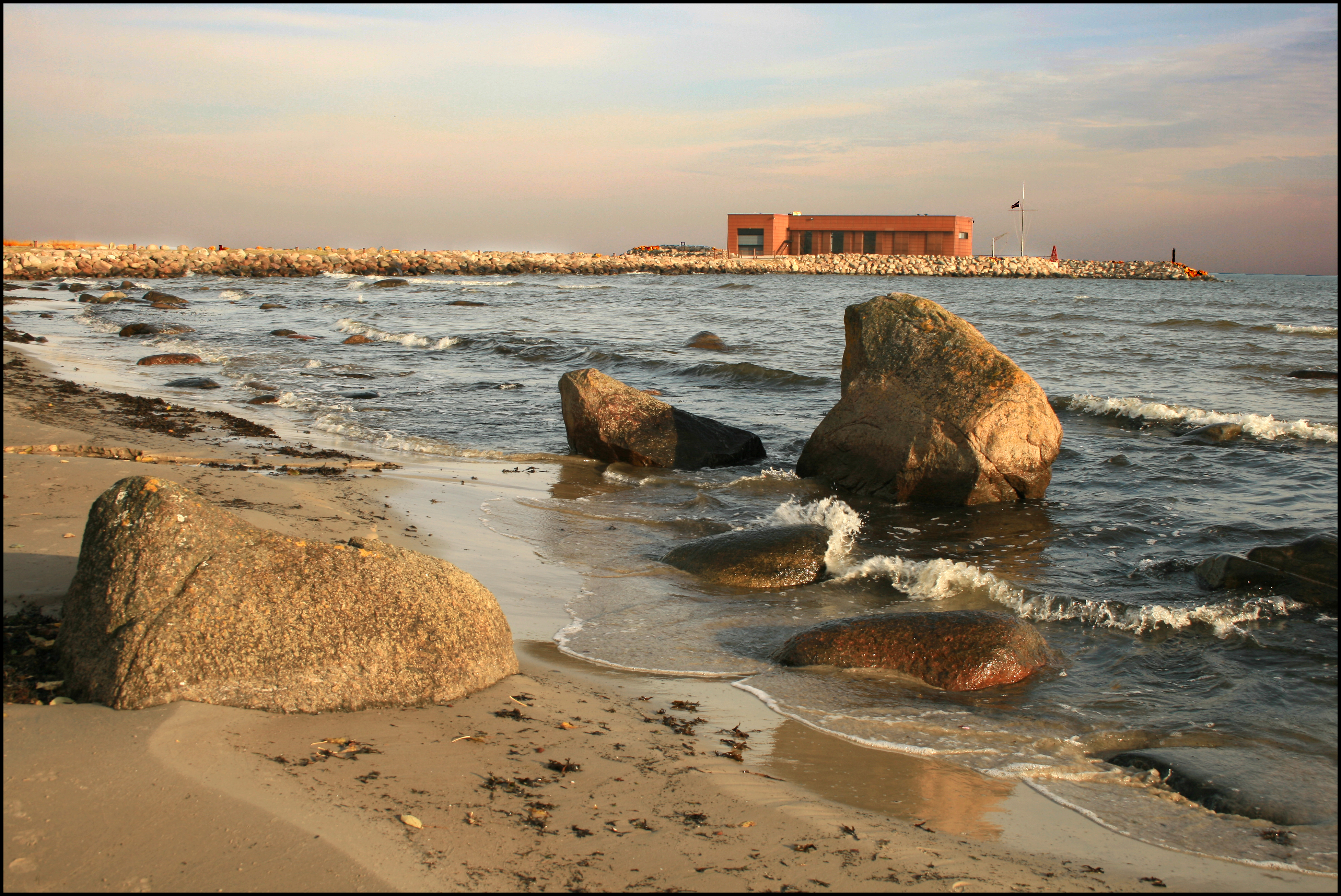 Kaltene